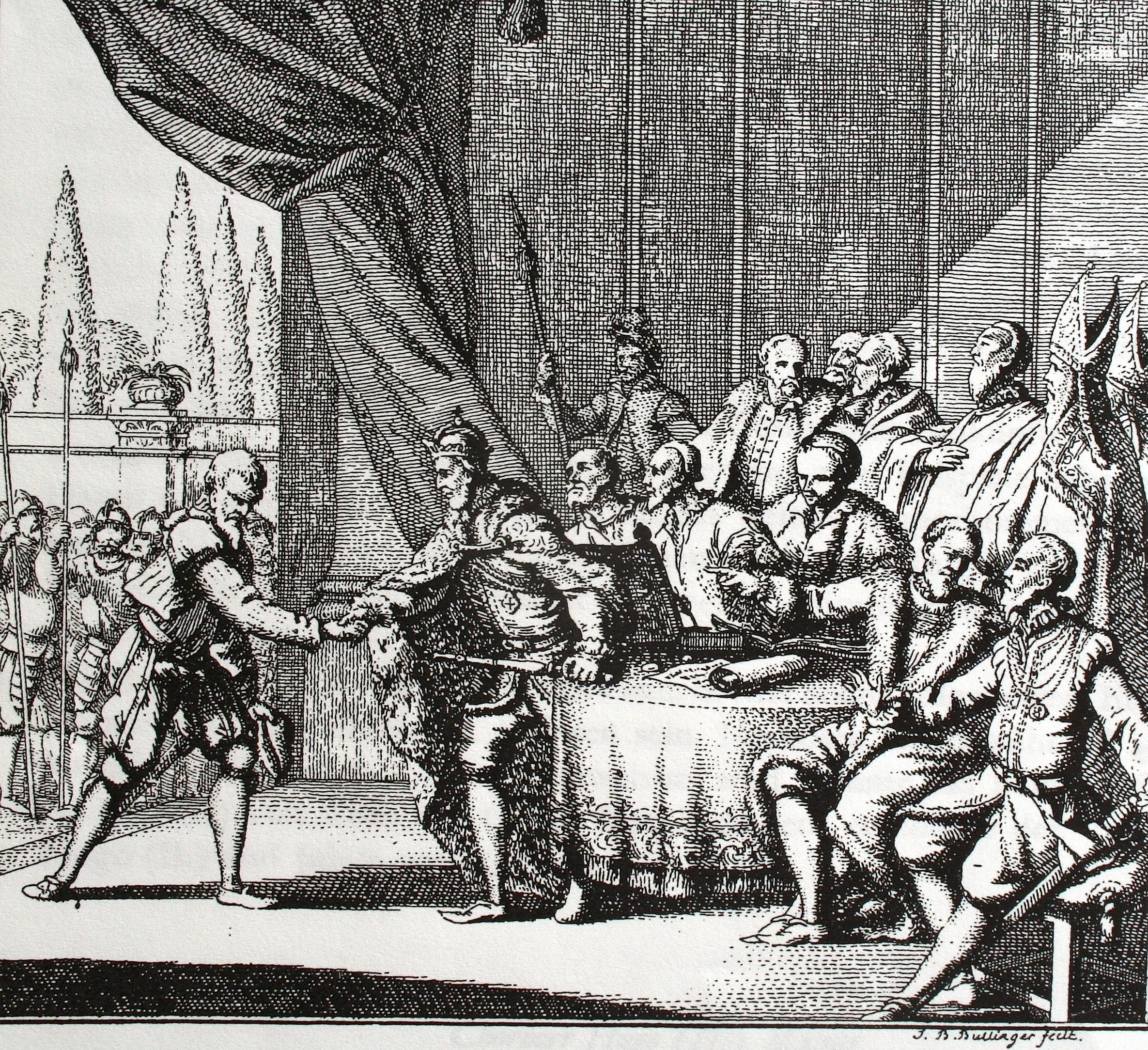 Rudolf Mülner der Ältere wird von König Rudolf von Habsburg in Mainz empfangen. Stich von Johann Balthasar Bullinger, Zürcher Neujahrsblatt 1776